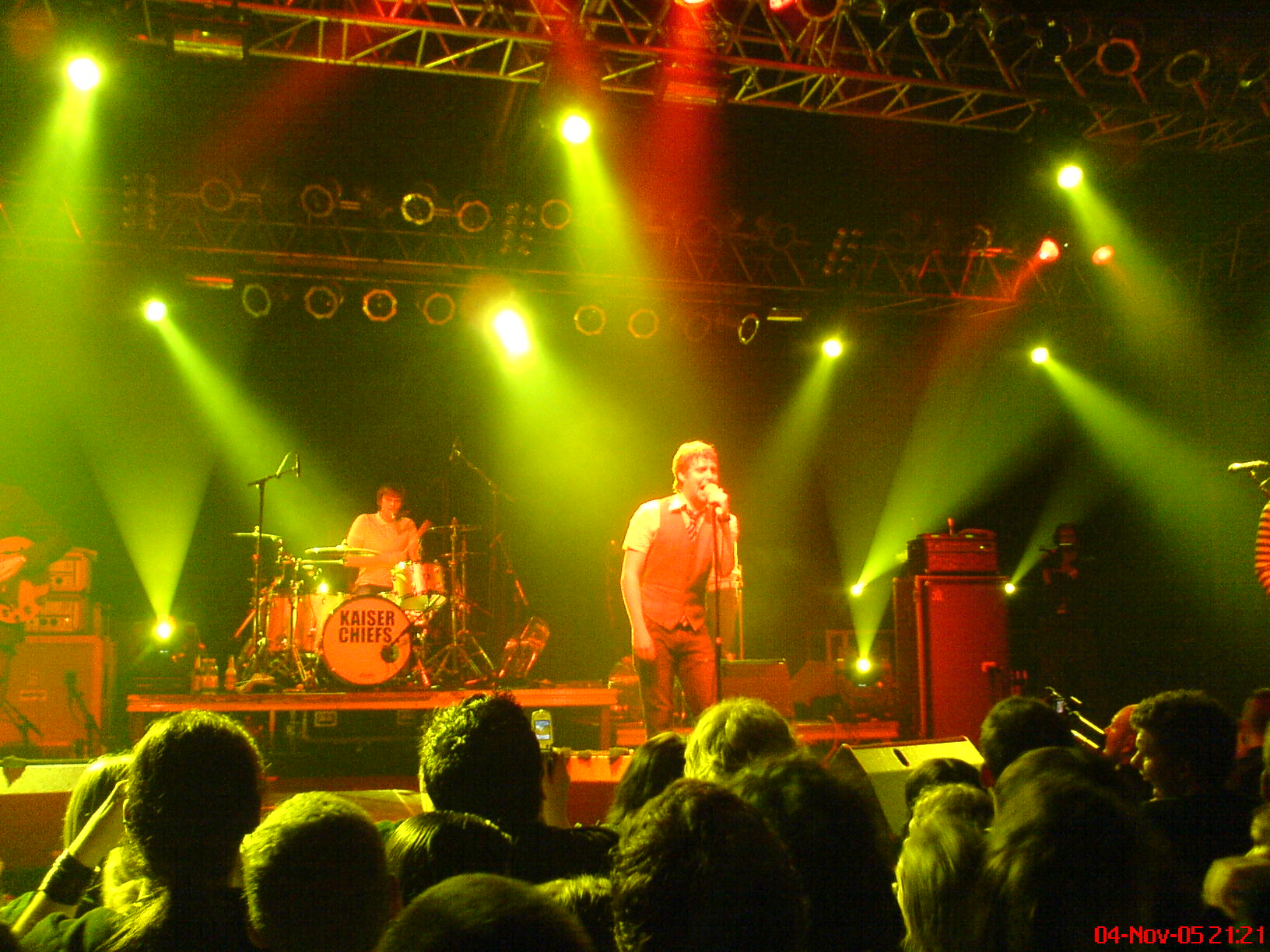 Kaiser Chiefs in Munich